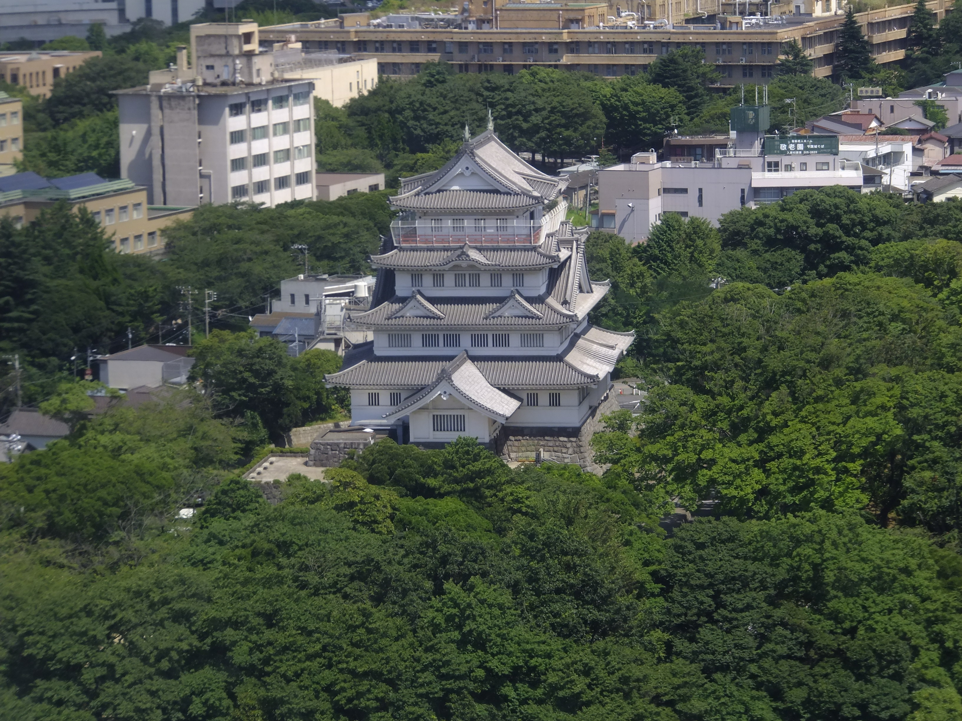 千葉県庁本庁舎から見た千葉市立郷土博物館